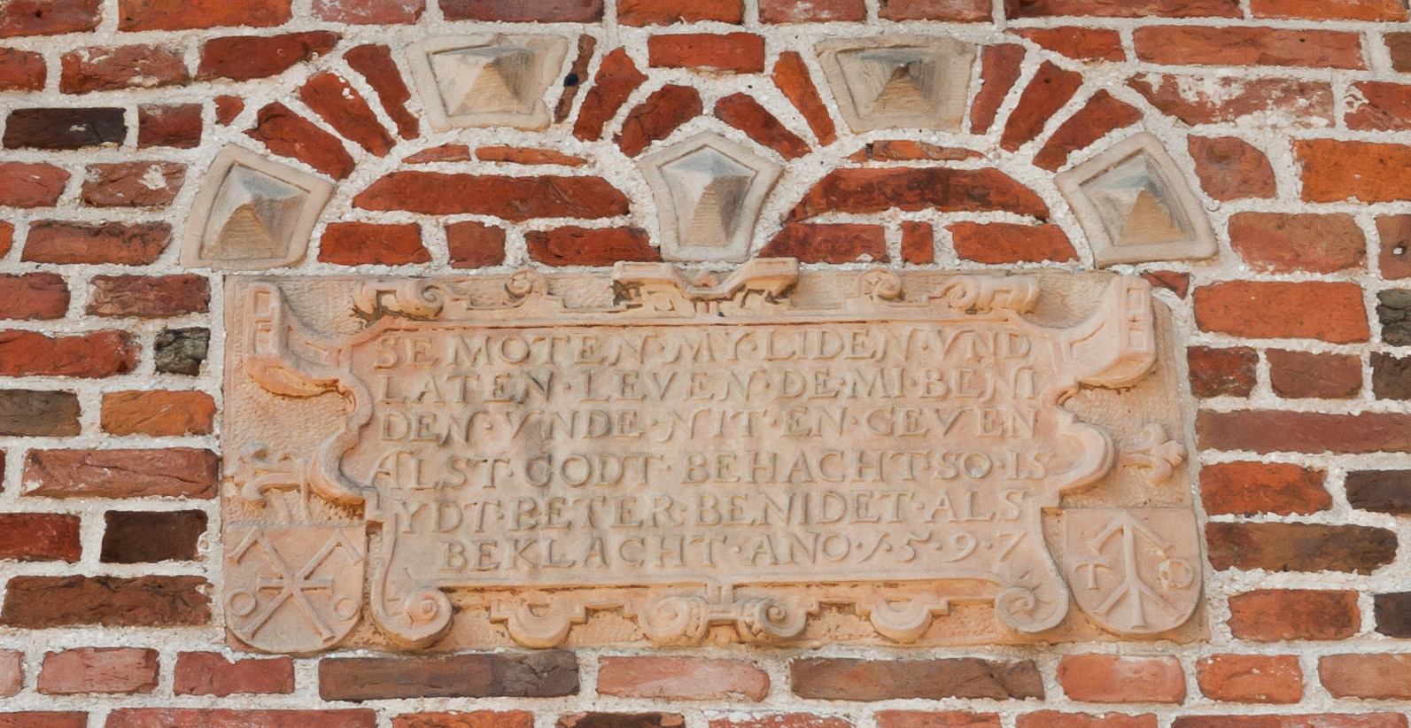 Spruchplatte über dem Eingangsportal des Rentmeisterhauses in Uttum (Krummhörn)